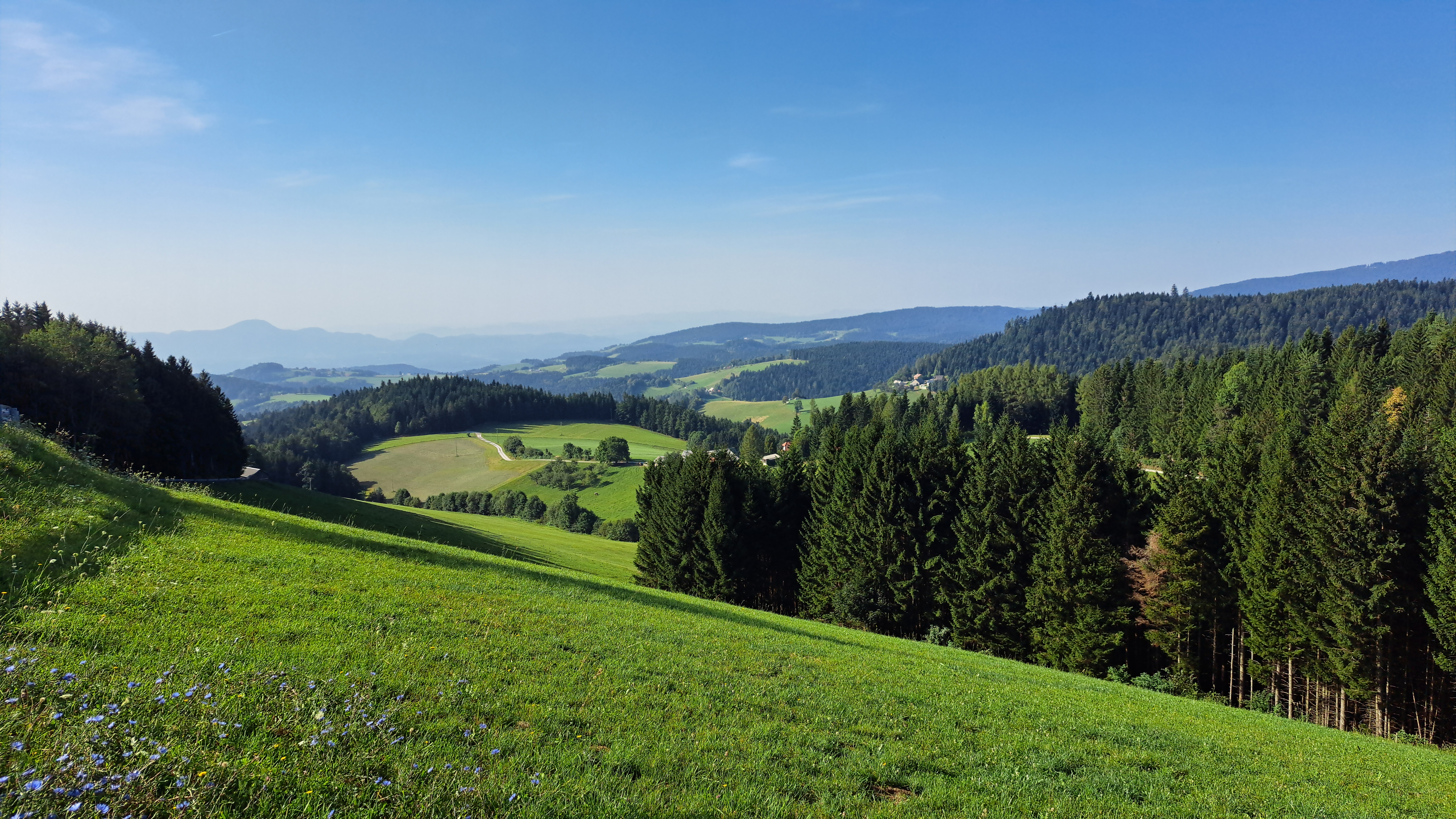 Mariborsko Pohorje, panorama. Pogled iz Frajhajma, nekoliko pod Arehom; vidi se Šmartno na Pohorju in Boč v ozadju.